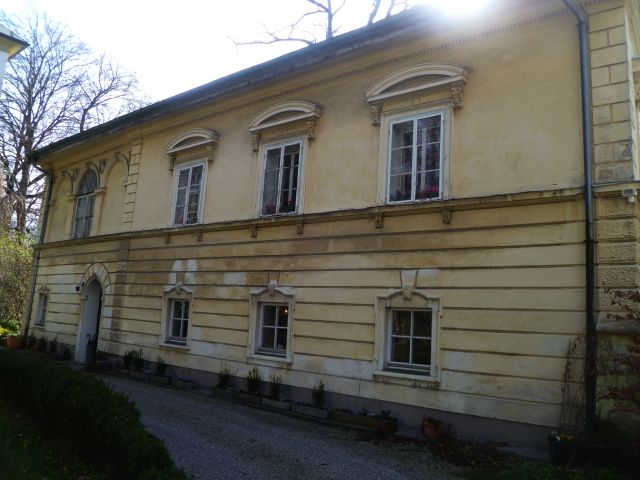 Nonntaler_Hauptstraße_51-53-Seitentrakt